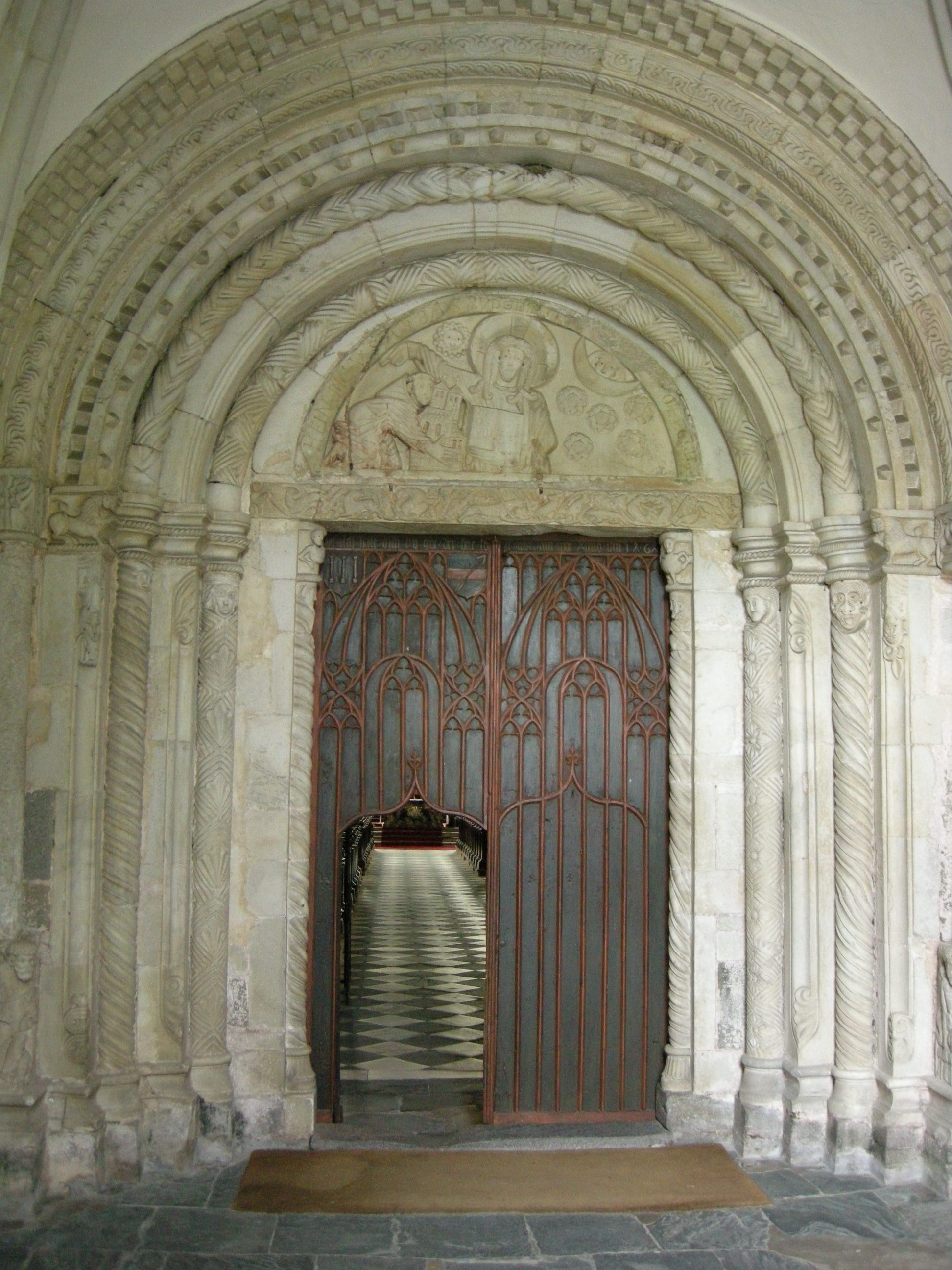 Millstatt, abbazia, interno 01 portale